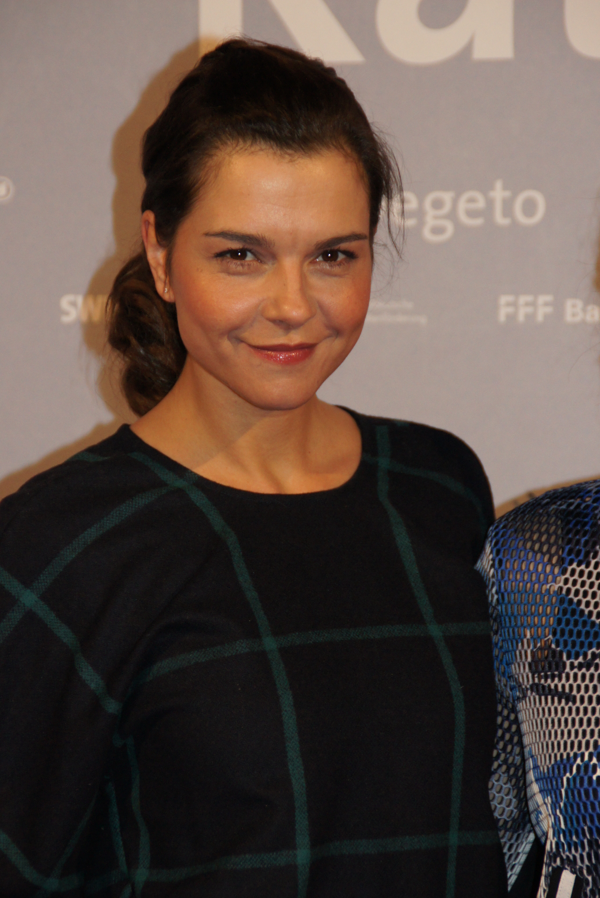 Susan Hoecke bei der Premiere von "Katharina Luther", Februar 2017, Berlin